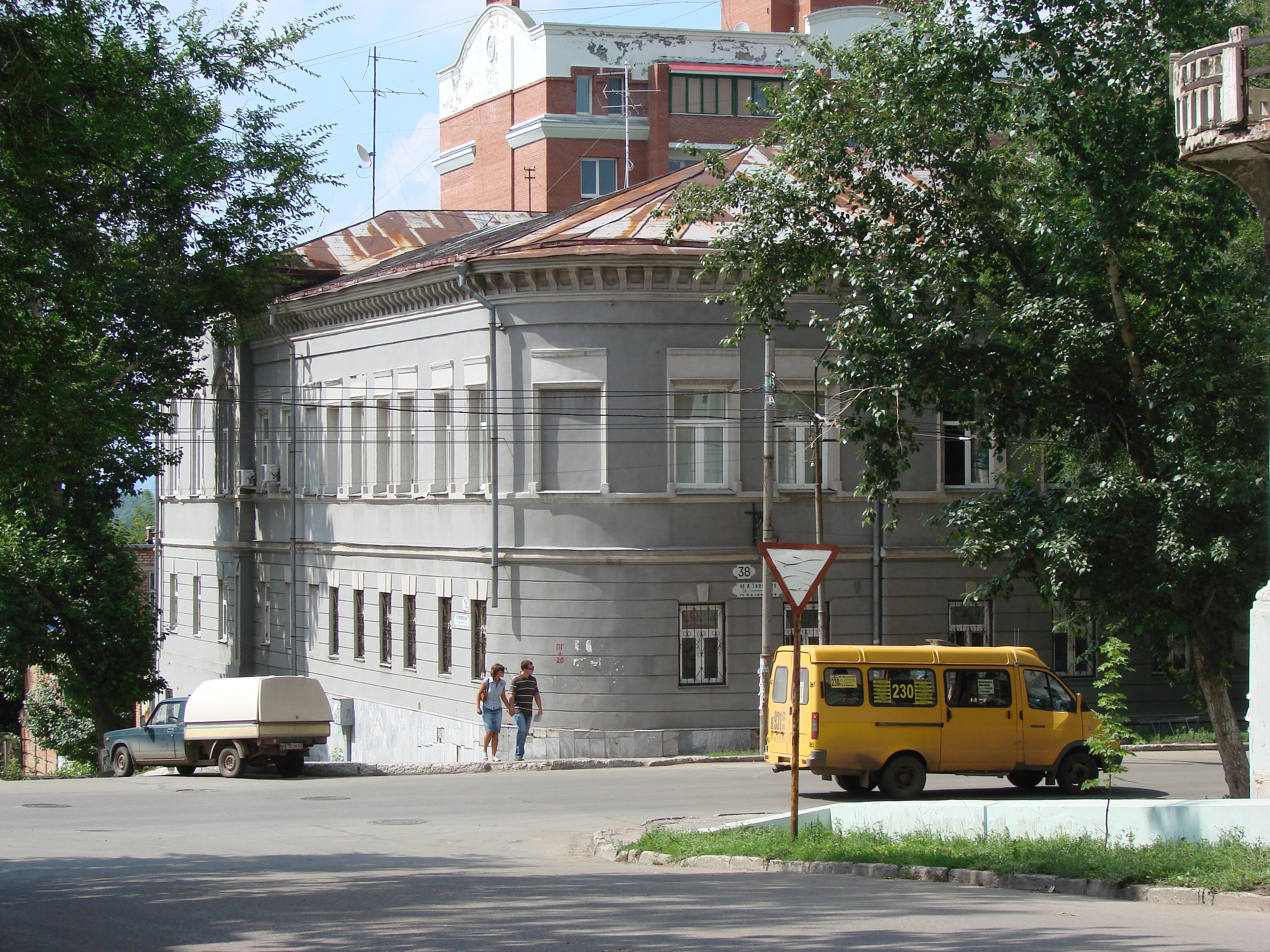 Комсомольская ул., 16, Алексея Толстого ул., 38 В настоящее время в здании размещается министерство образования и науки Самарской области